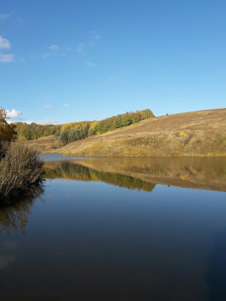 Россия, Республика Татарстан, Высокогорский район, с.Инся